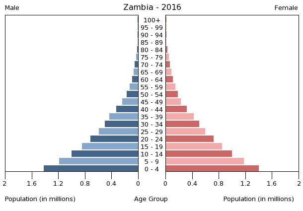 A population pyramid illustrates the age and sex structure of a country's population and may provide insights about political and social stability, as well as economic development. The population is distributed along the horizontal axis, with males shown on the left and females on the right. The male and female populations are broken down into 5-year age groups represented as horizontal bars along the vertical axis, with the youngest age groups at the bottom and the oldest at the top. The shape of the population pyramid gradually evolves over time based on fertility, mortality, and international migration trends.